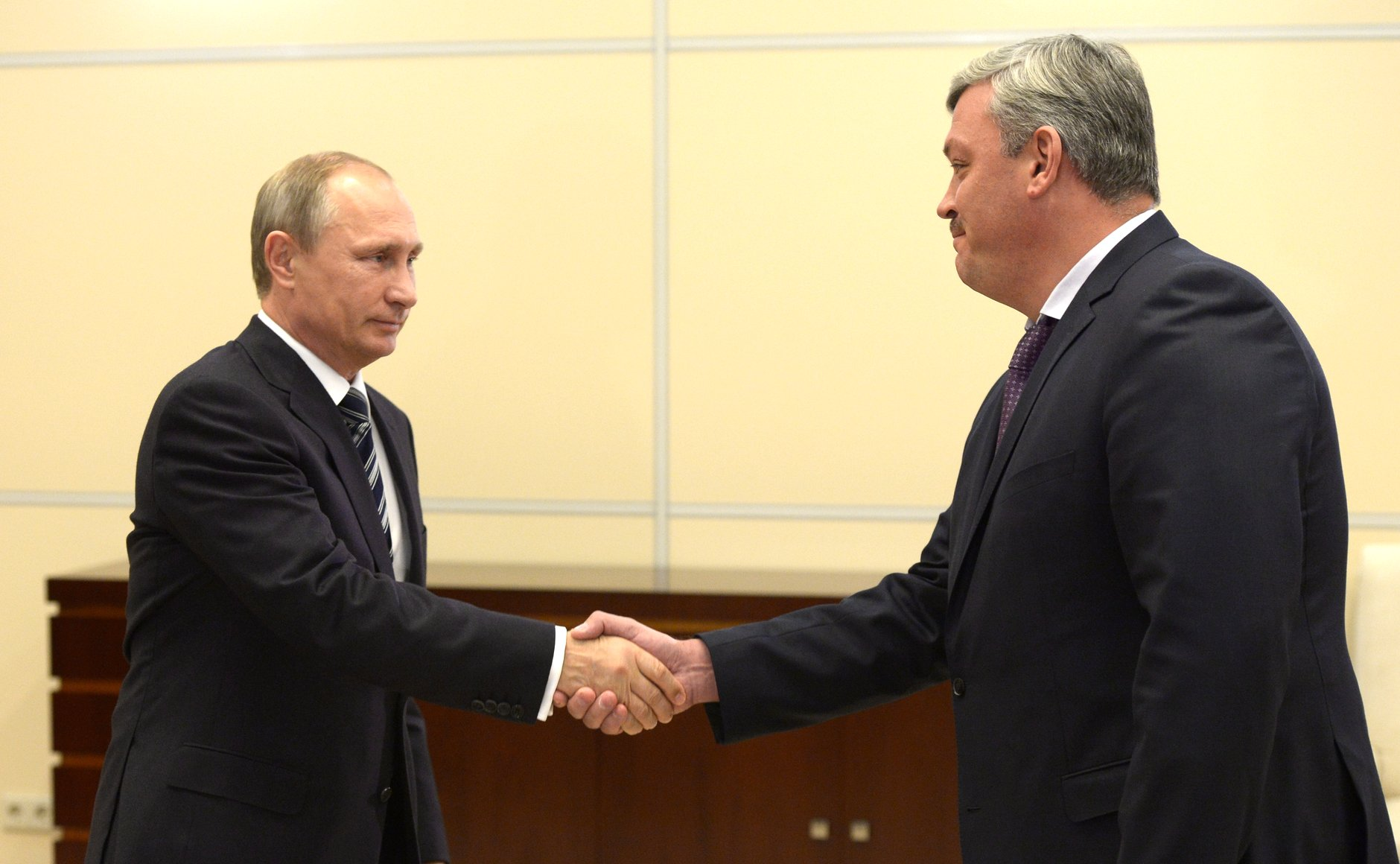 Владимир Путин с исполняющим обязанности главы Республики Коми Сергеем Гапликовым